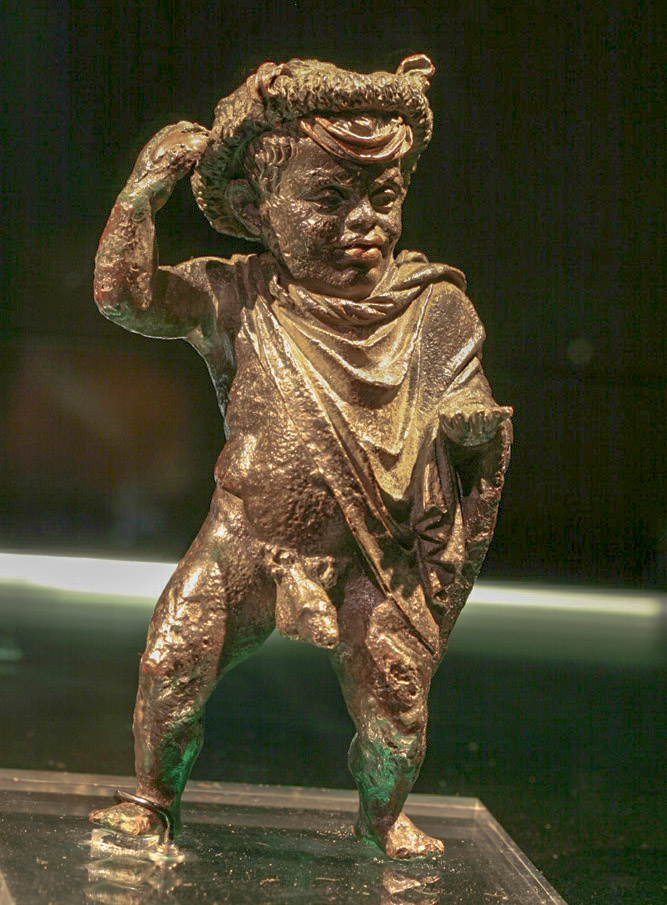 Römische Bronzestatuette eines Zwerges, 1. Jahrhundert v. Chr.